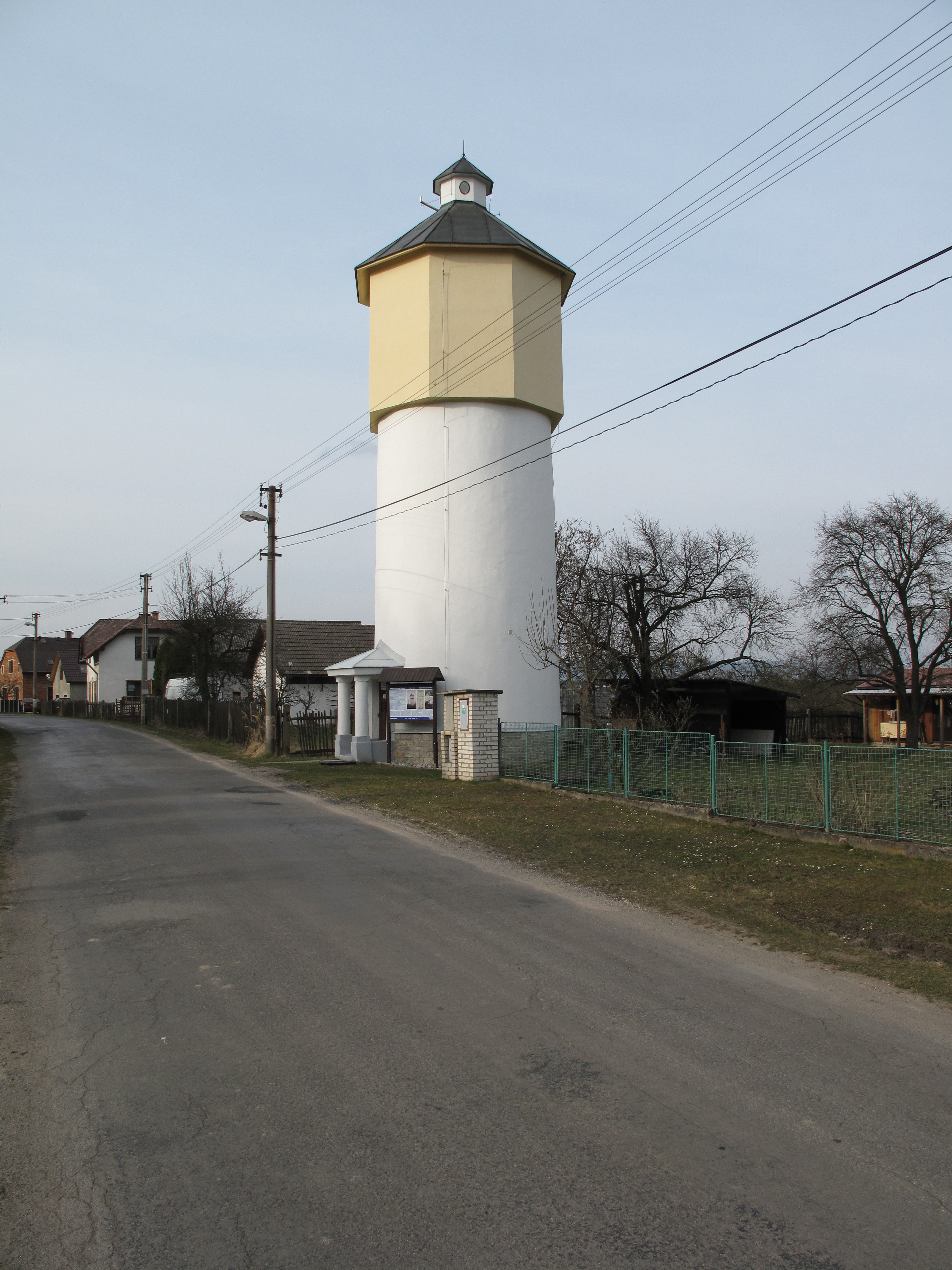 Vodárna v Rostkově. Okres Mladá Boleslav, Česká republika.